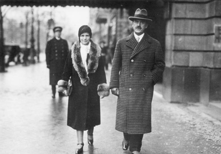 Scherl Bilderdienst Thomas Mann in Berlin Auf der Durchreise nach Stockholm 1929 ist Thomas Mann in Berlin eingetroffen und hat im Hotel Adlon Wohnung genommen. Thomas Mann verlässt mit seiner Gattin das Hotel. 41175-29